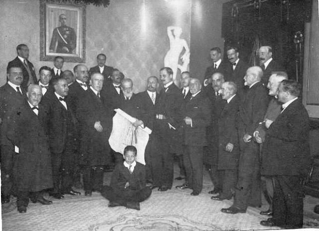 Toma de posesión de Alejandro Ferrant y Fischermans como académico de honra 28-7-1915